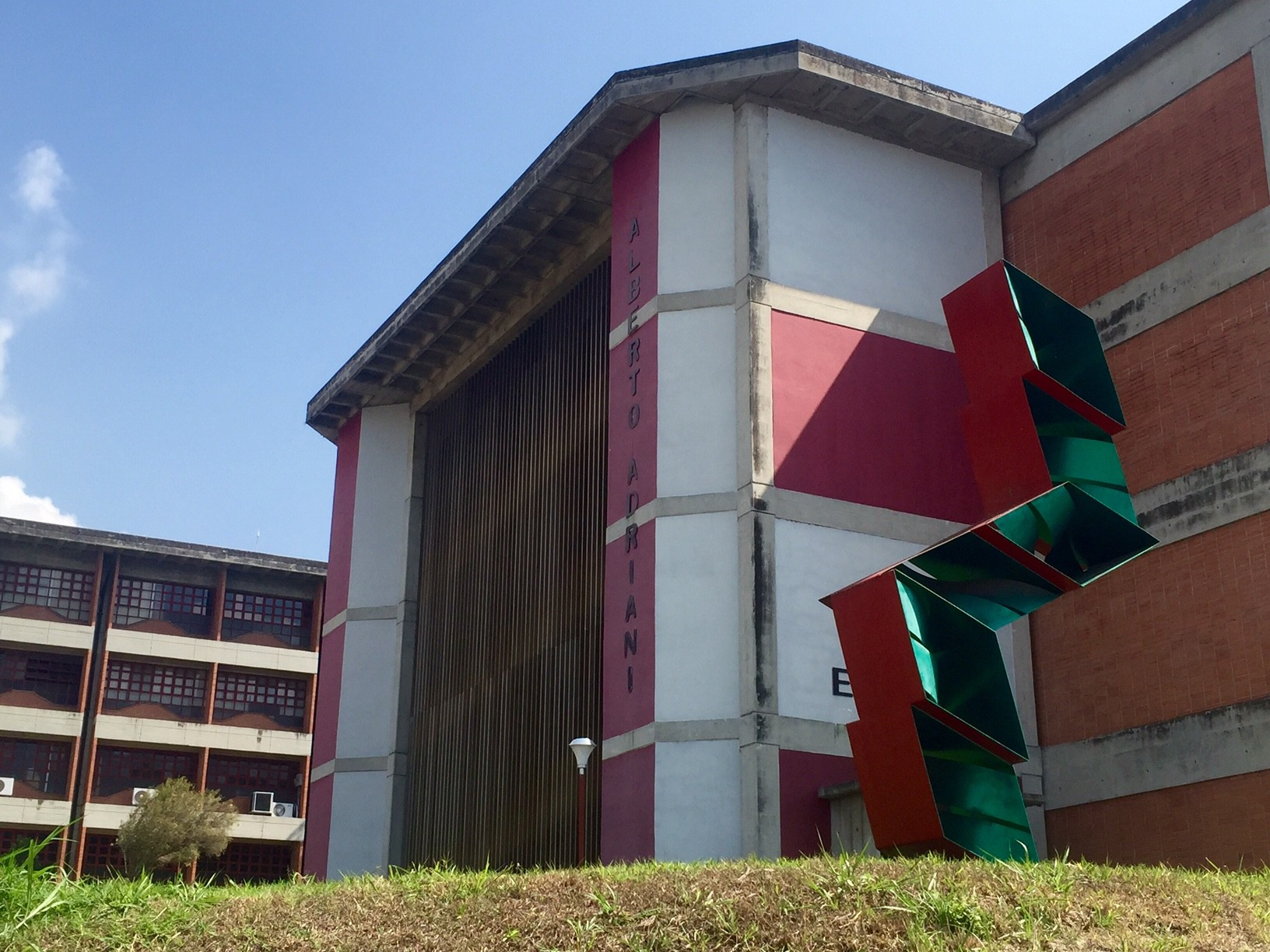 Edificio H de la Facultad de Ciencias Económicas y Sociales de la Universidad de Los Andes, Mérida, Venezuela.